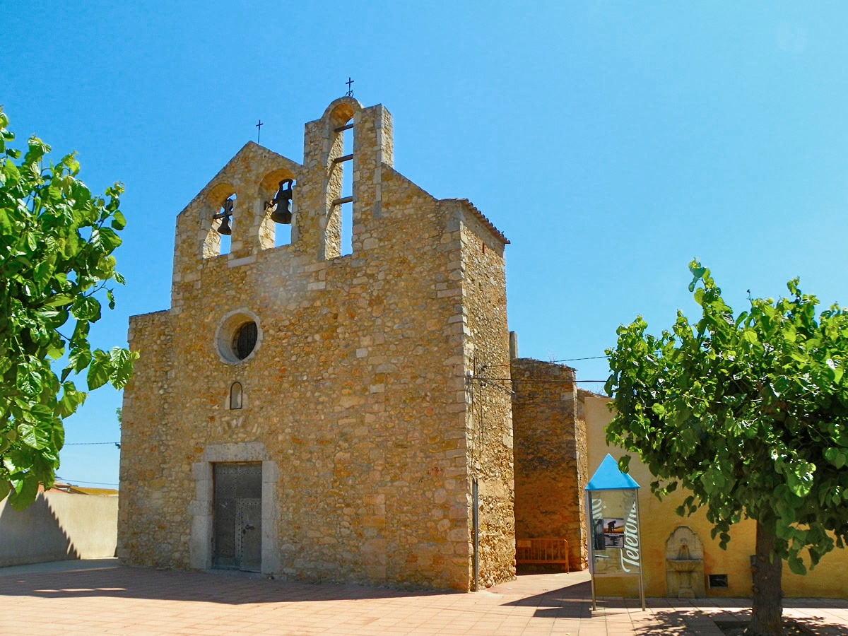 Sant Quirze de Viladamat